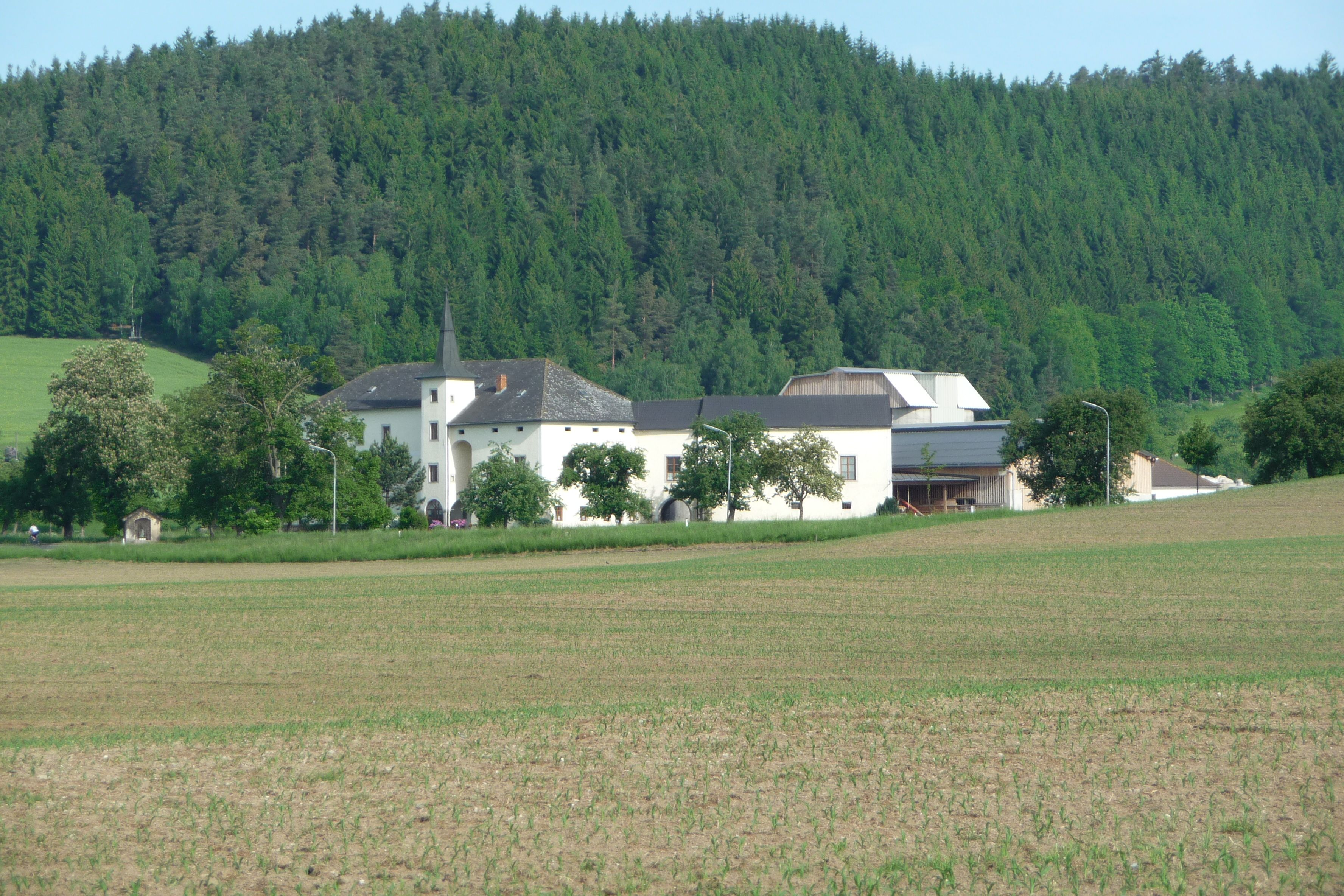 Fuchsenhof